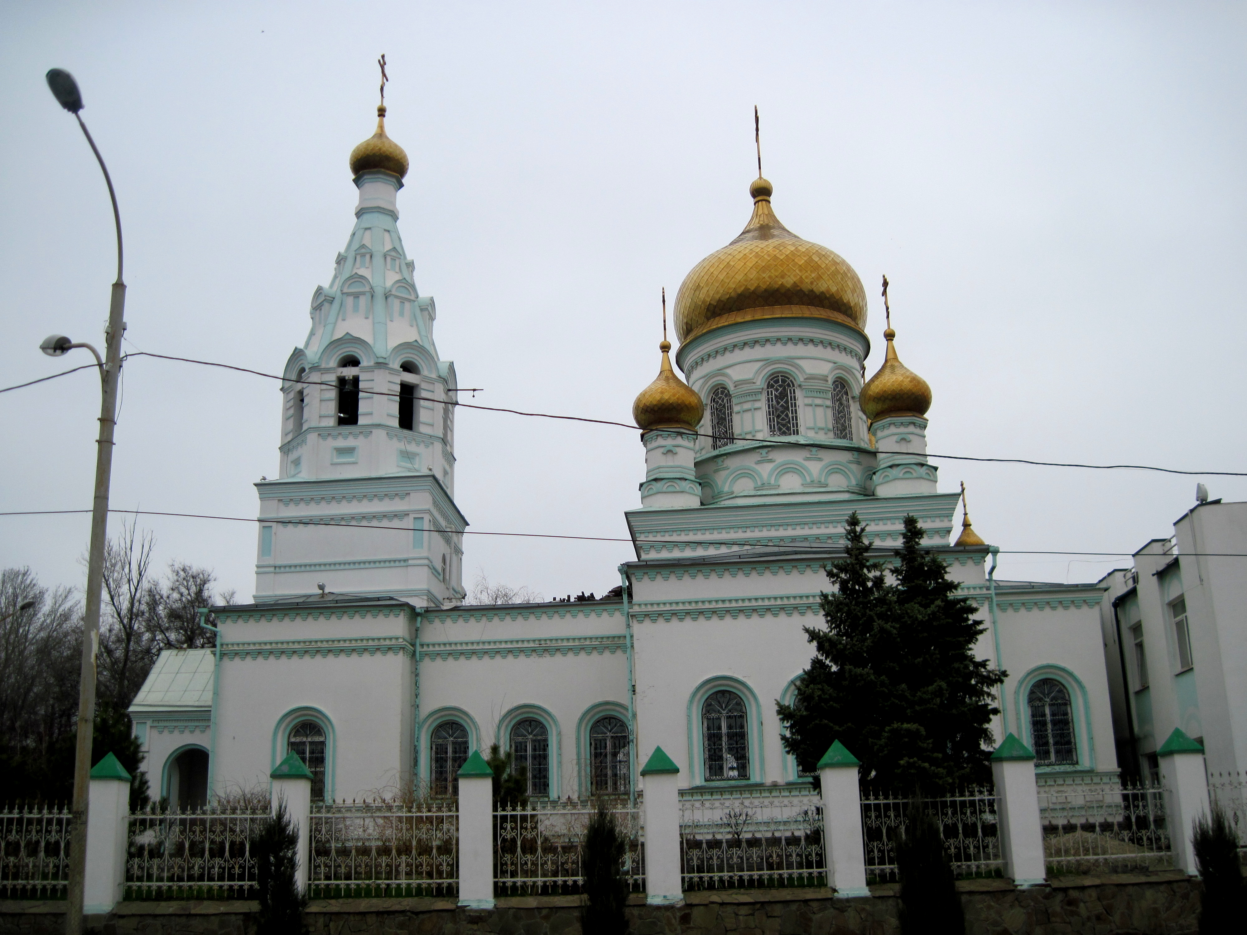 Церковь во имя Святого Серафима Саровского: улица Портовая, 72, Ростов-на-Дону, Ростовская область